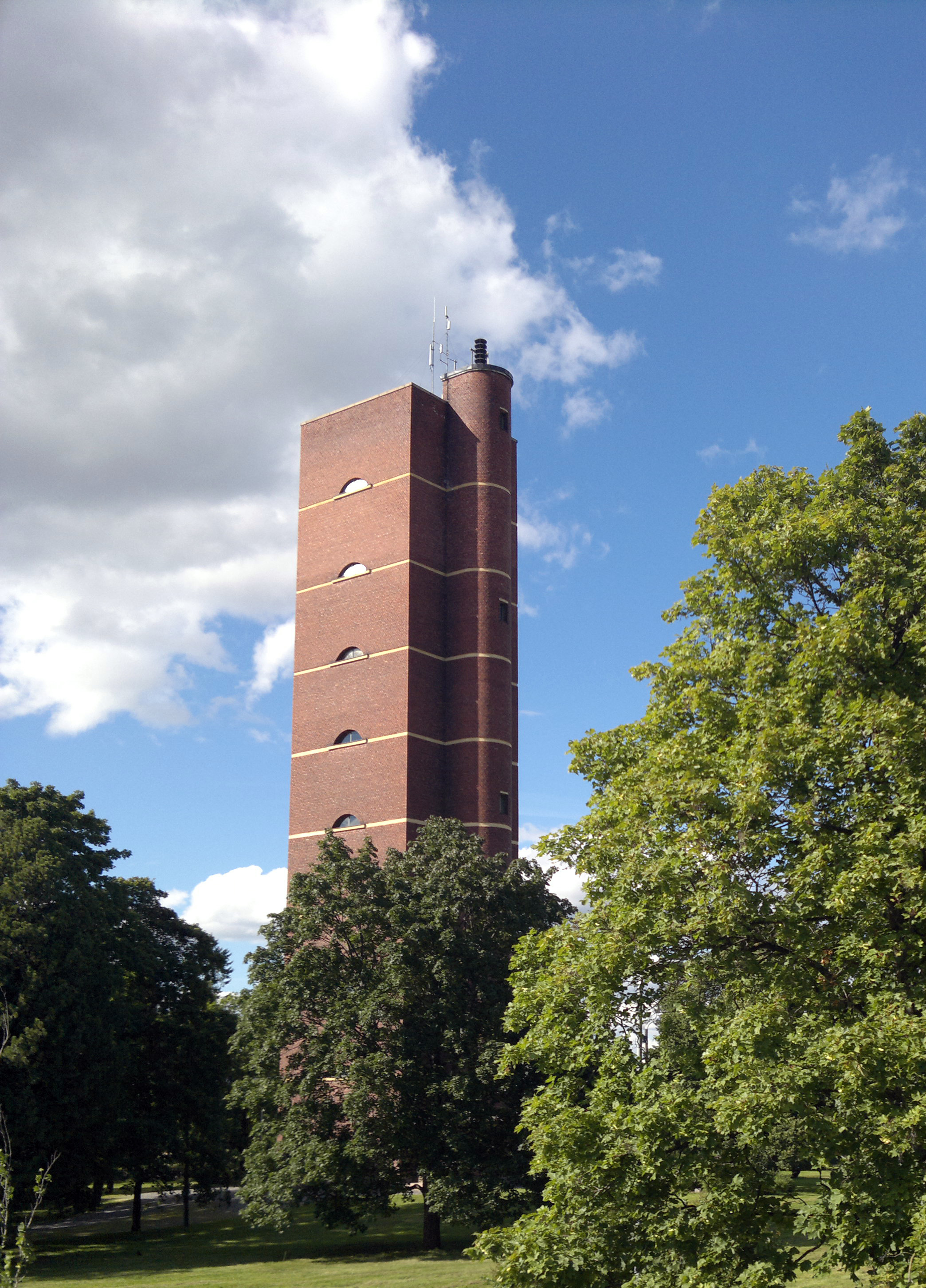 Porin vesitorni.